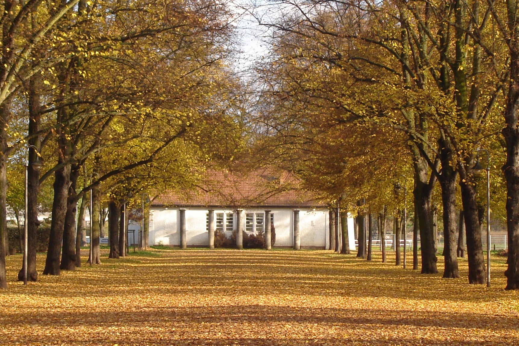 Magdeburg-Herrenkrug, Pferderennbahn (Kulturdenkmal)